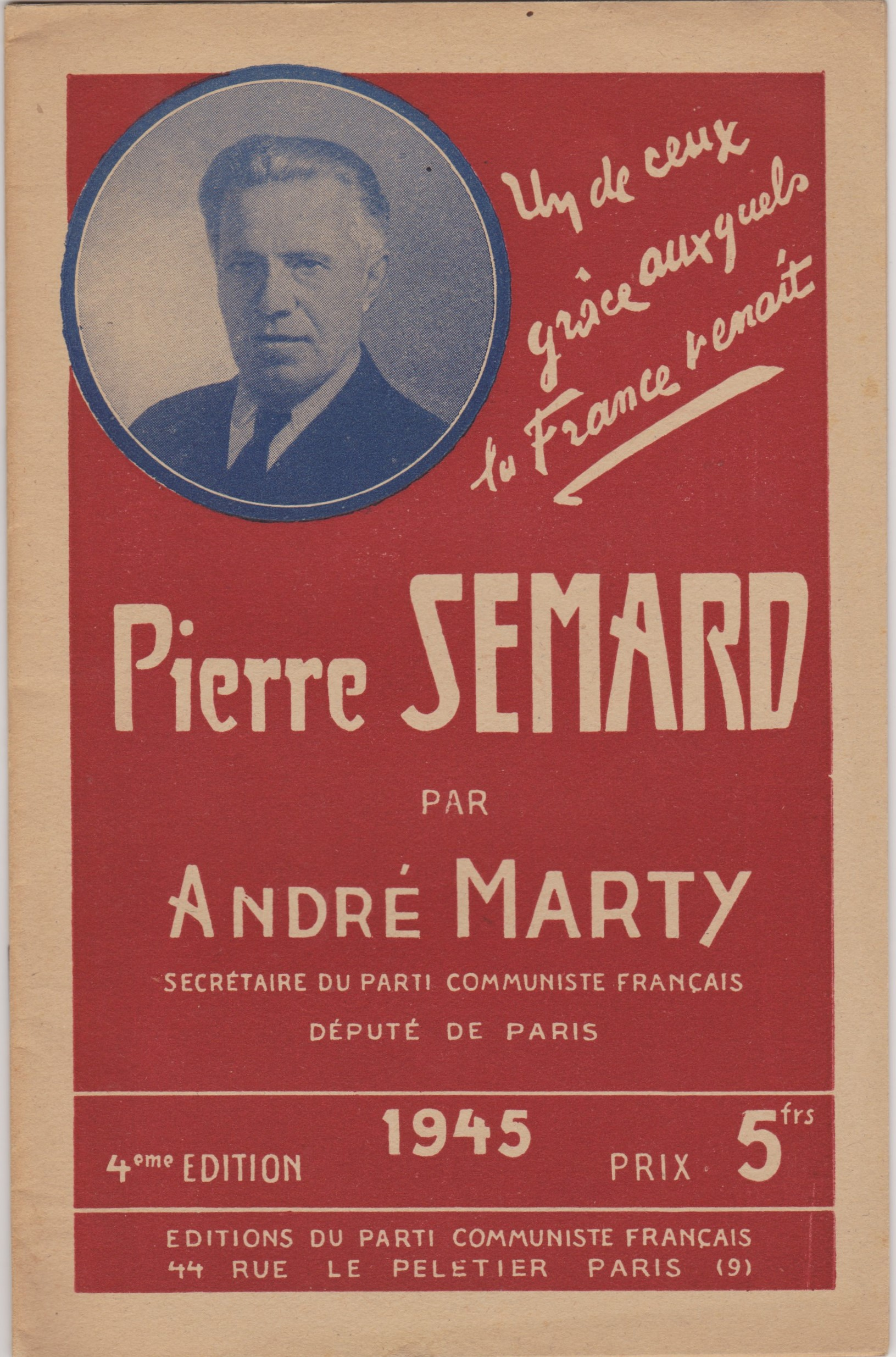 Brochure de 16 pages, au format 21 x 13 cm.